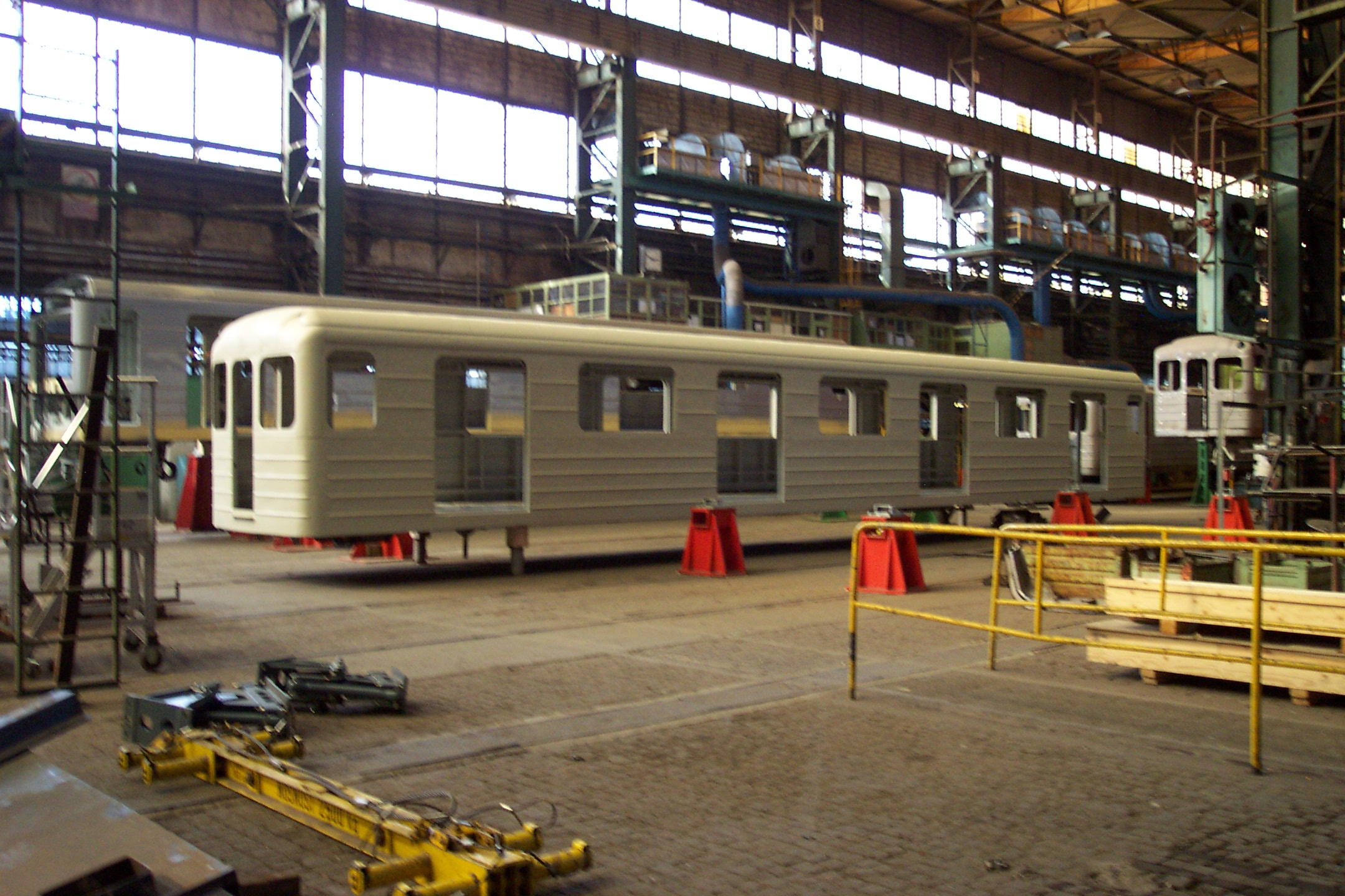 Plzeň, the unfinished metro car type 81-71M in Škoda factory - Plzeň, nedokončený vůz metra typu 81-71M, vyráběný v továrně společnosti Škoda